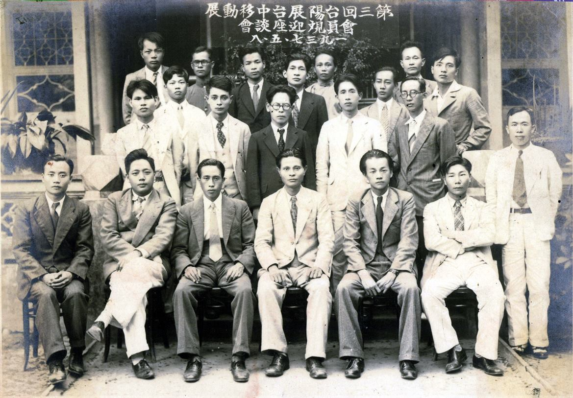 第三回臺楊展臺中移動展會員歡迎座談會。前排左起陳德旺、楊三郎、李梅樹、陳澄波、李石樵、洪瑞麟等，前排右一張星建、右二林文騰，二排左二楊逵、二排左三田中保男（田中保雄）、後排左三巫永福，後排立者右起吳天賞、莊遂性、（隔一人）葉陶、張深切、巫永福、莊銘鐺。攝影於臺中州俱樂部。